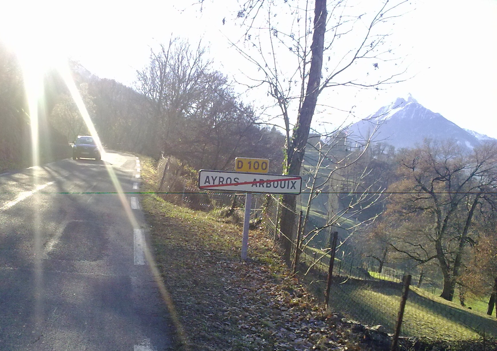 Sortie de Ayros-Arbouix